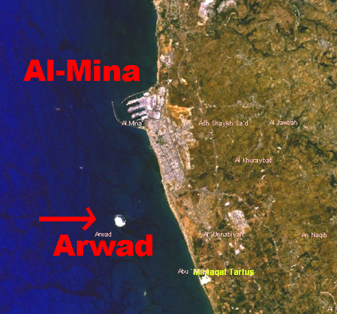 Satelitenbild Tartus und Al Mina